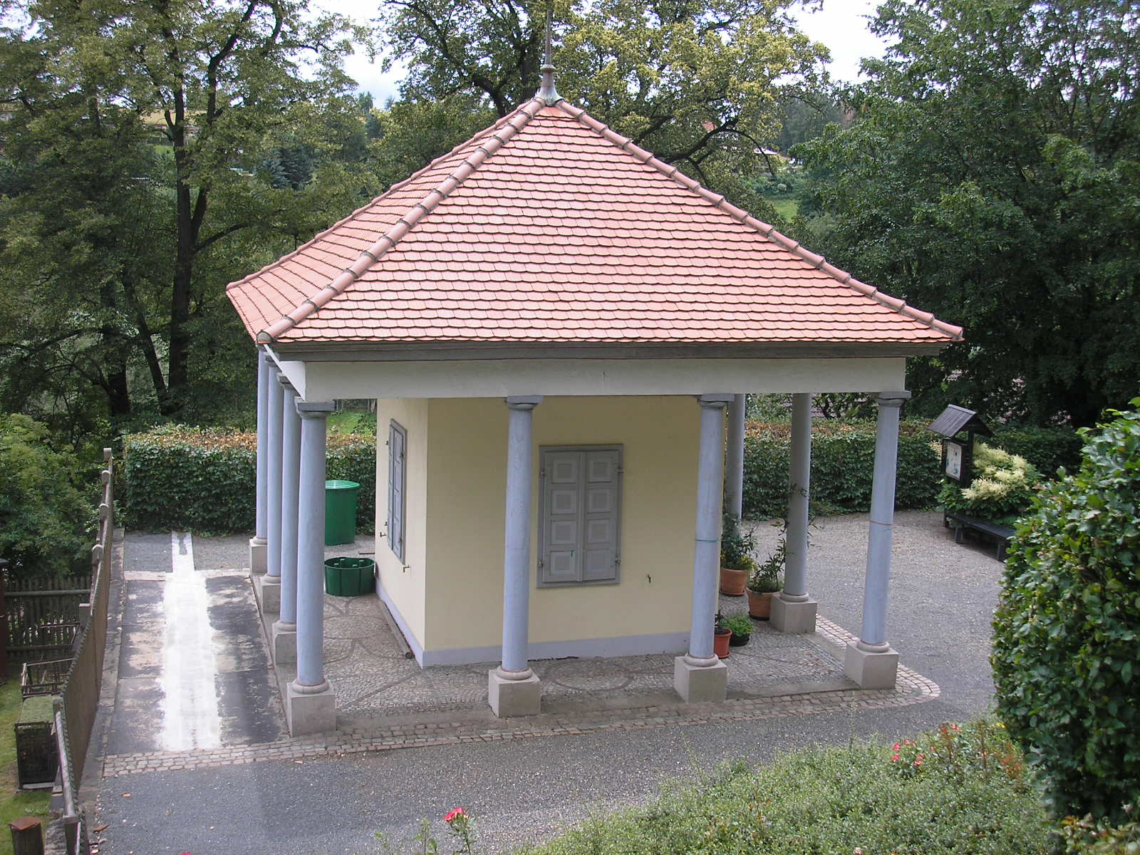 Ein Pavillon im Schlossgarten in Eisenberg (Thüringen).